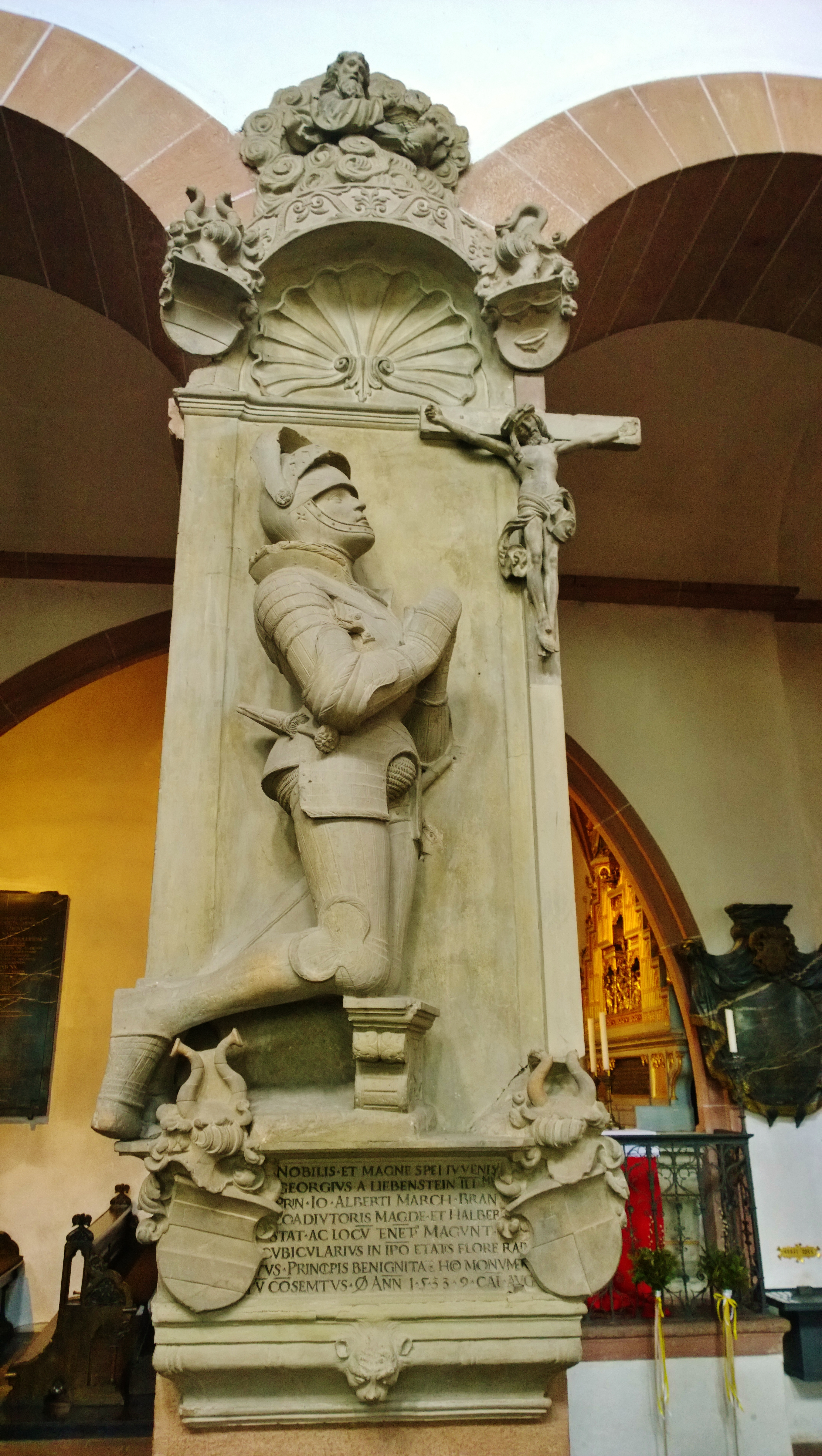 Georg von Liebenstein, Kämmerer des Kurfürsten Albrecht (†1533) in Aschaffenburg. Freifigur des Ritters, vor dem Kruzifix kniend, über dem Muschelaufsatz die Halbfigur Gottvaters in den Wolken, grüner Sandstein, ein Werk des Heidelberger Moritz Lechler aus dem Backoffenkreis. Pfeiler am Nordrand des Hauptschiffs LHN3, um 1533